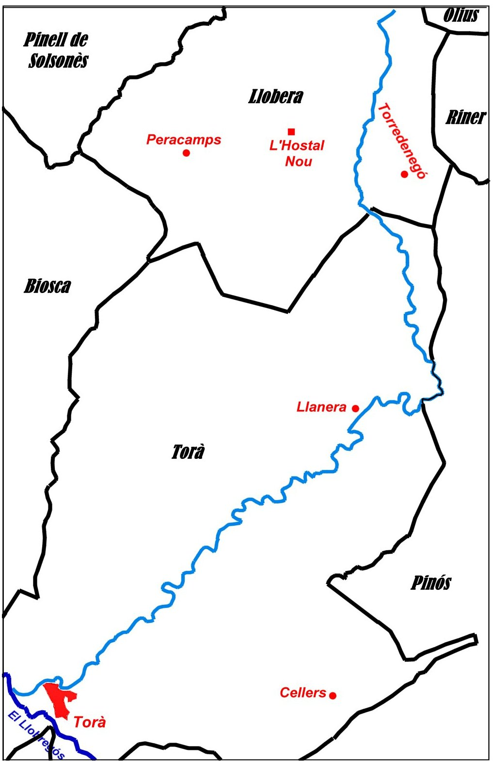 Mapa del curs de la Riera de Llanera amb els termes municipals per on passa.